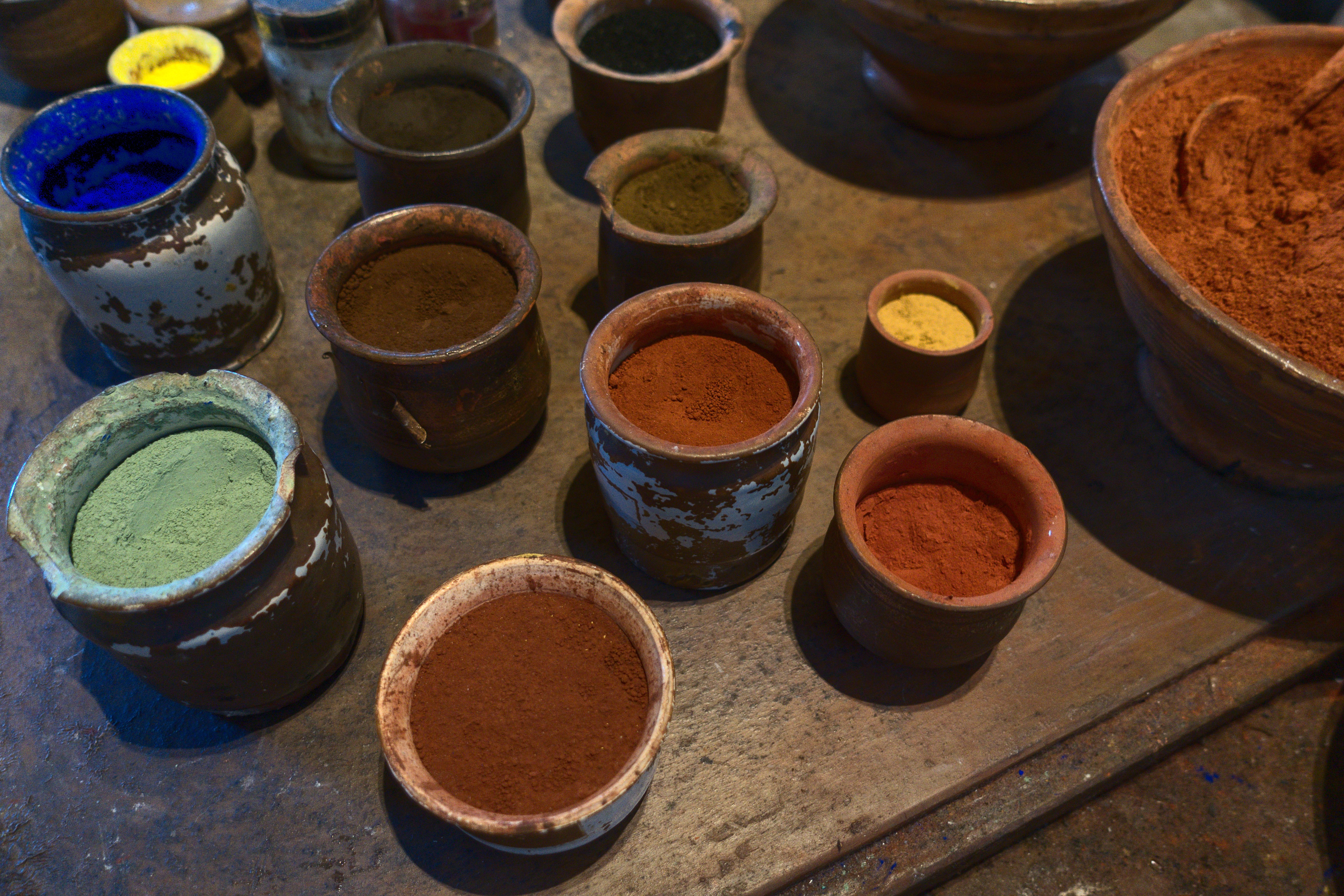 Pigmenten in het Rembrandtshuis